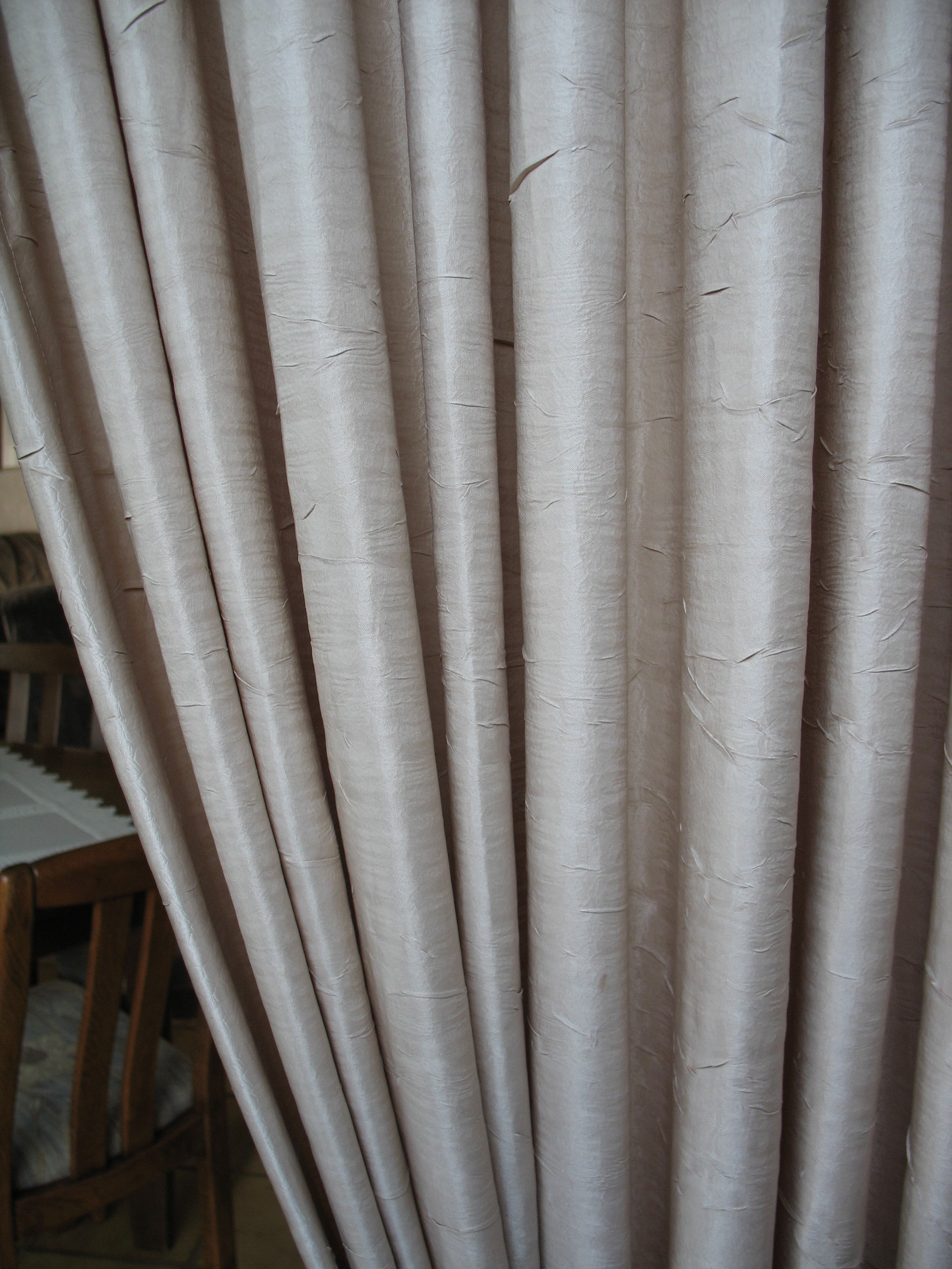 Vorhang